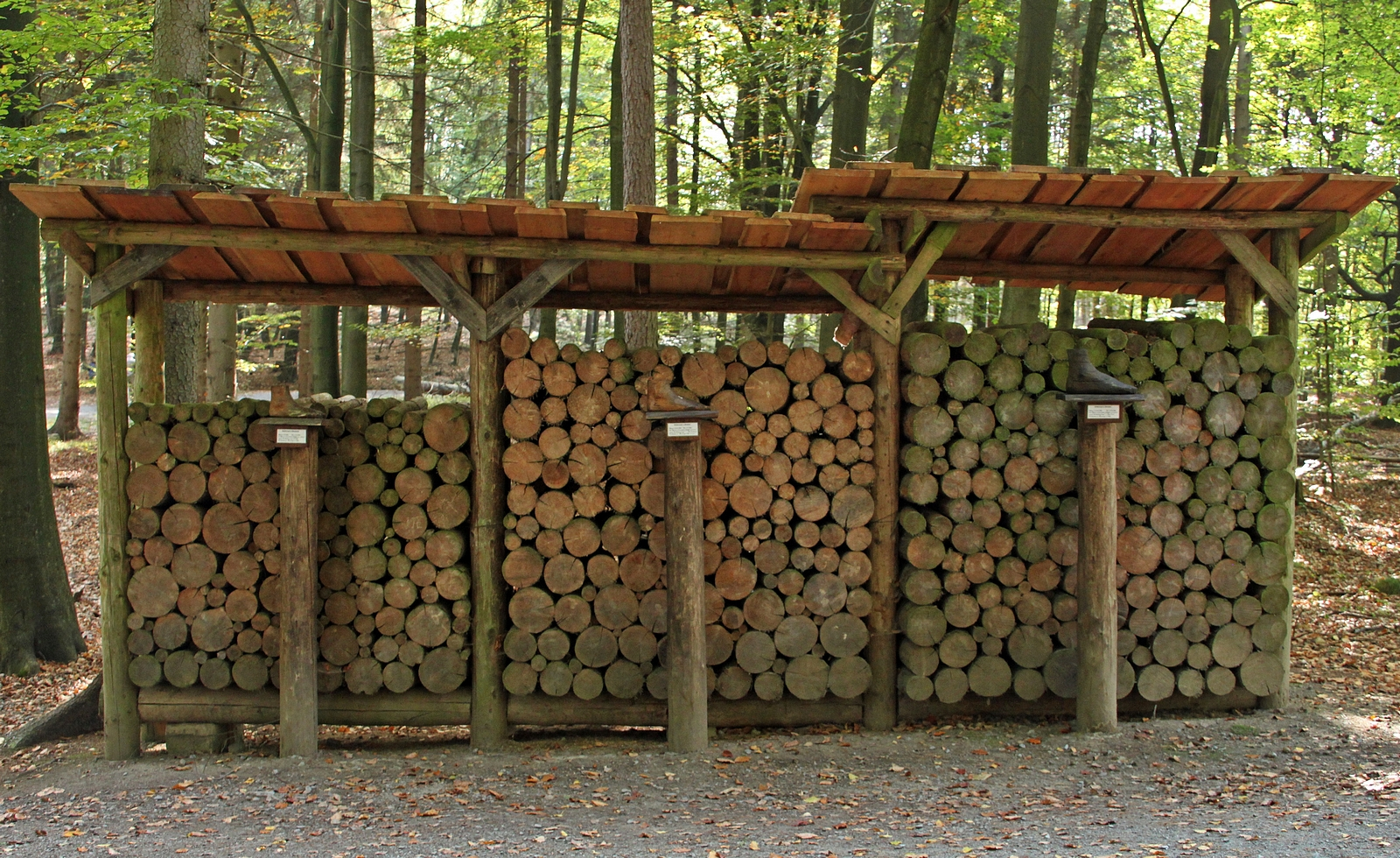 Hinterhermsdorf, Walderlebniszentrum "Waldhusche": Nachbau der regional verschieden großen Holzmengen eines "Klafters", eines alten Volumenmaßes für Holz. Dargestellt sind das preußische Klaftermaß (rechts mit einer Fußlänge von 0,31385 Meter und einem Volumen von 108 Kubikfuß = 3,3389 Kubikmeter), das sächsische Klaftermaß (mitte mit einer Fußlänge von 0,2833 Meter und einem Volumen von 108 Kubikfuß = 2,45 Kubikmeter) und das Klaftermaß in Darmstadt (links mit einer Fußlänge von 0,25 Meter und einem Volumen von 100 Kubikfuß = 1,5625 Kubikmeter) .